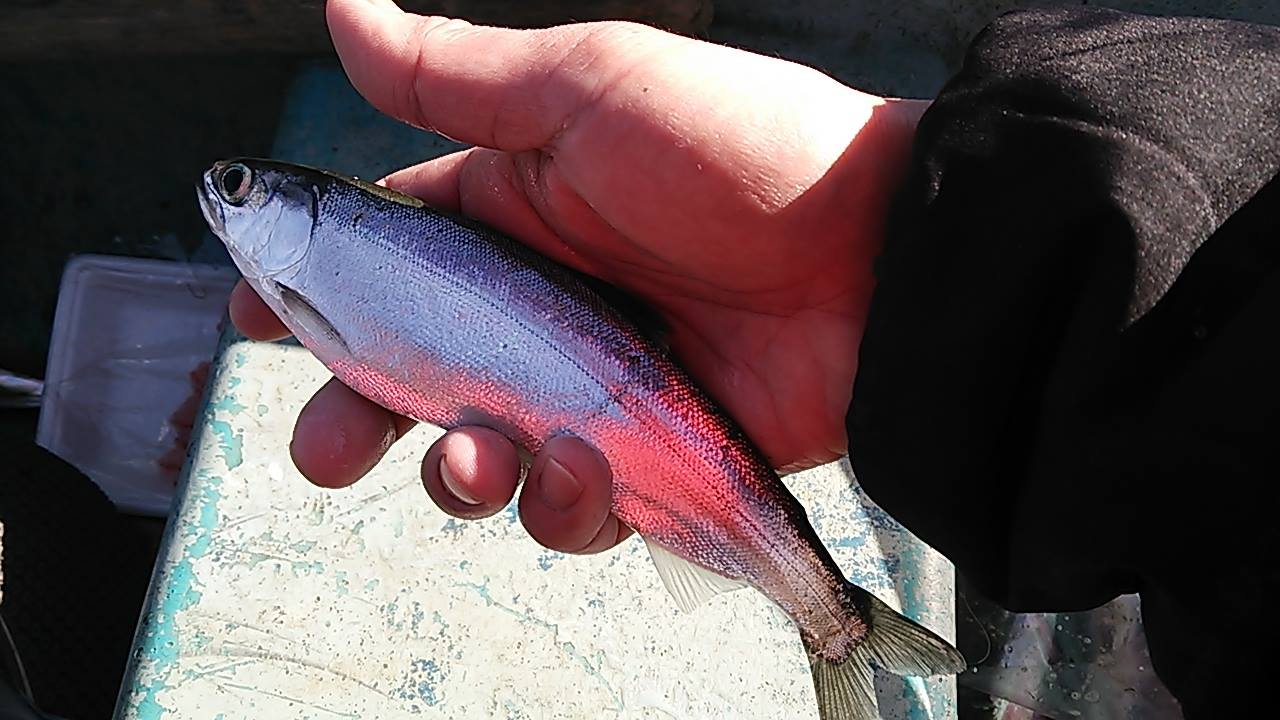 西湖で釣り上げたヒメマス。 13-12-30